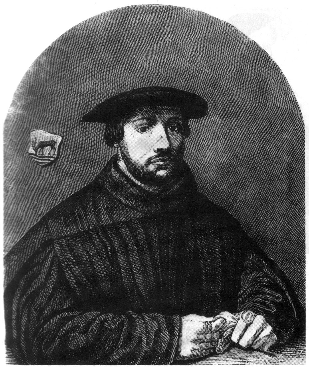 Konrad Heresbach (1496—1576), Anhänger von Erasmus von Rotterdam und Schüler von Ulrich Zasius; Lehrer Herzog Wilhelm des Reichen; Initiator des modernen Rechts im Herzogtum Jülich/ Cleve/ Berg (1555); zeitgenössischer Stich.